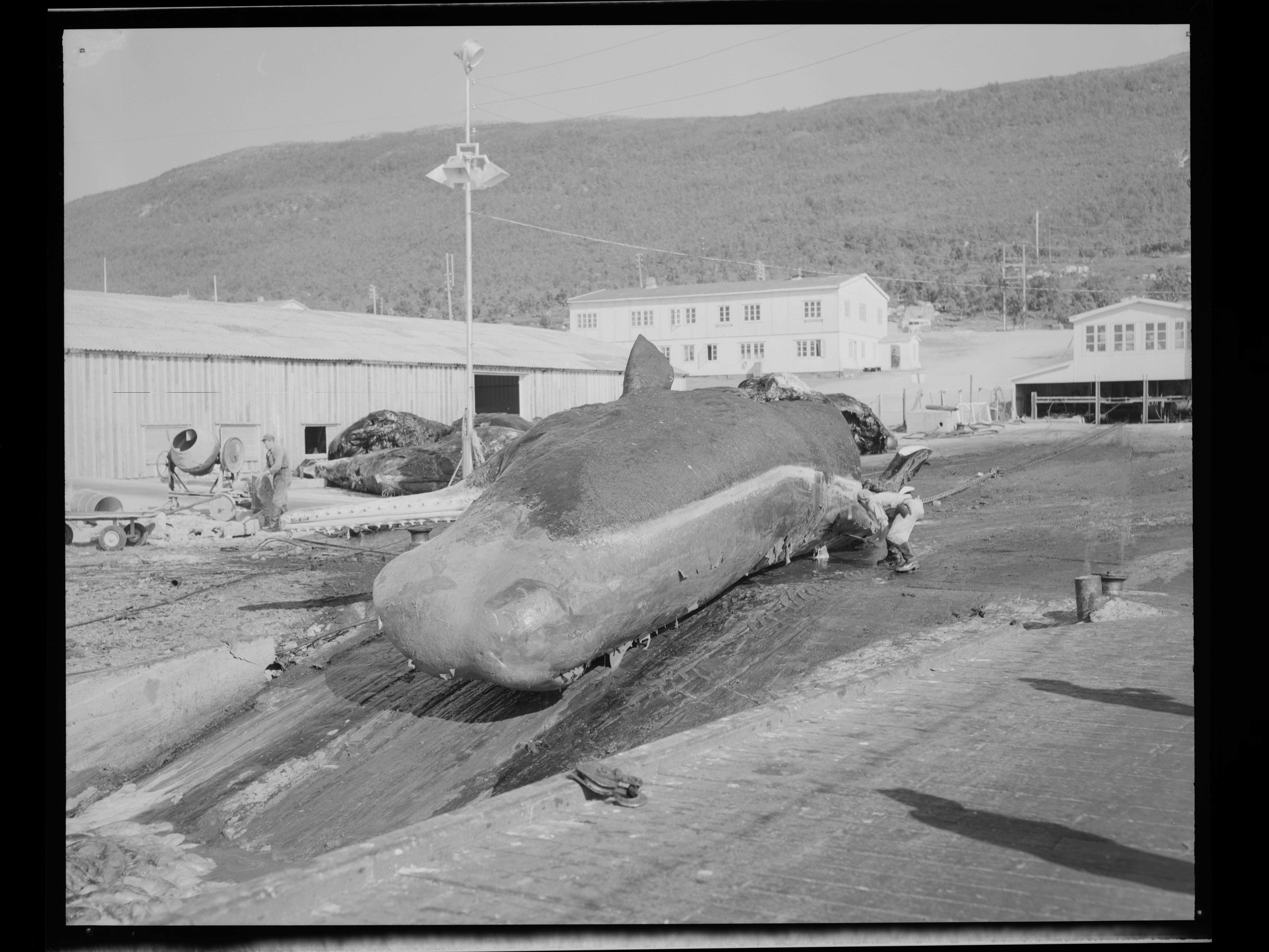 Bildet er hentet fra Nasjonalbibliotekets bildesamling. Anmerkninger til bildet var: Fotograf: ÅM Tromsøysund, Tromsø, Troms